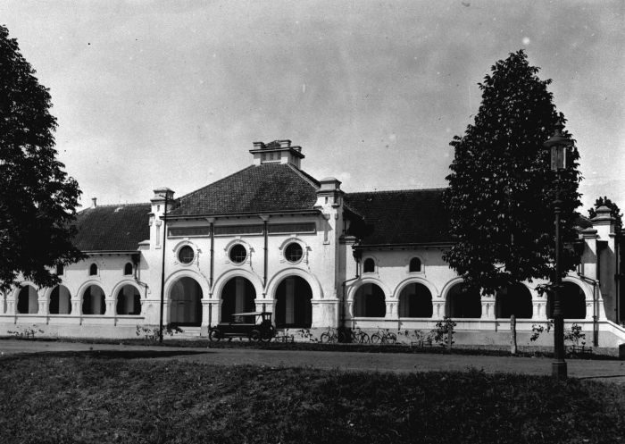 Foto. Tekst op de gevel: Raad van Justitie Anno 1917. Gebouw van de Raad van Justitie te Makassar op Celebes.